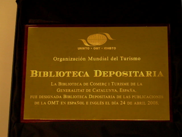 Biblioteca de Empresa y Empleo